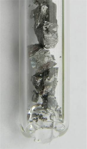 Bildbeschreibung: Beryllium Quelle: Foto aus meiner Sammlung chemischer Elemente Fotograf/Zeichner: Tomihahndorf Datum: März 2006